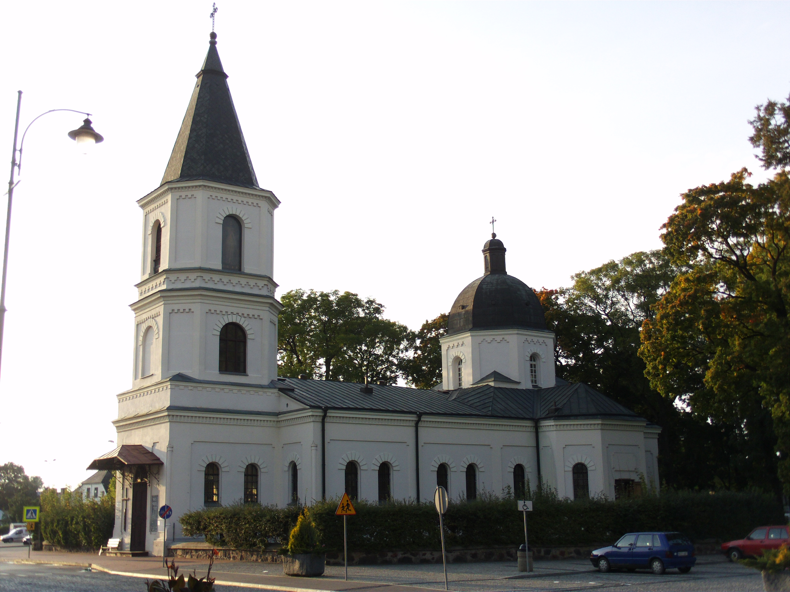 Suwałki. Dawna cerkiew prawosławna, ob. kościół Najświętszego Serca Jezusa